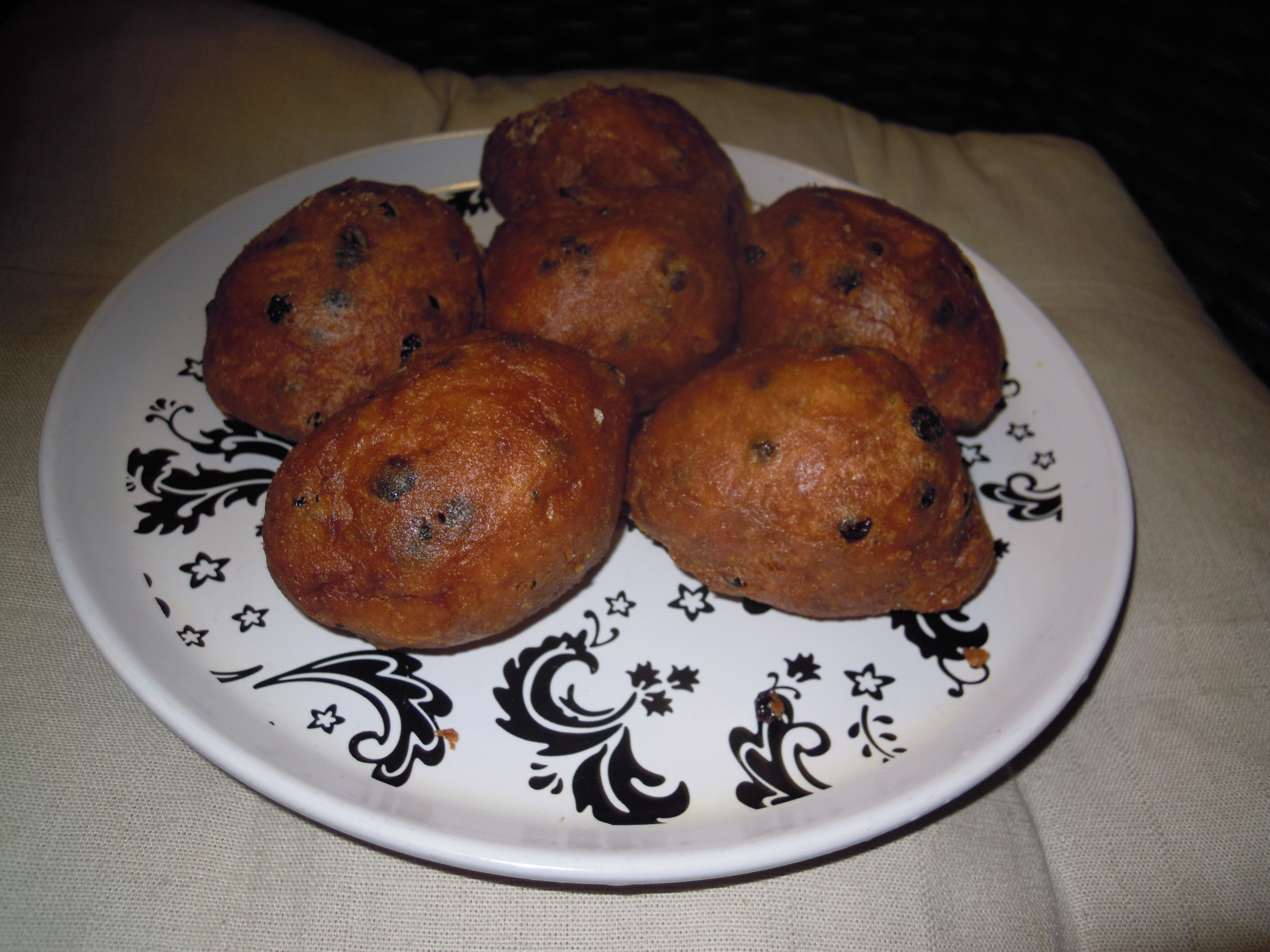 Oliebollen van Richard Visser, de lekkerste van Nederland volgens het AD